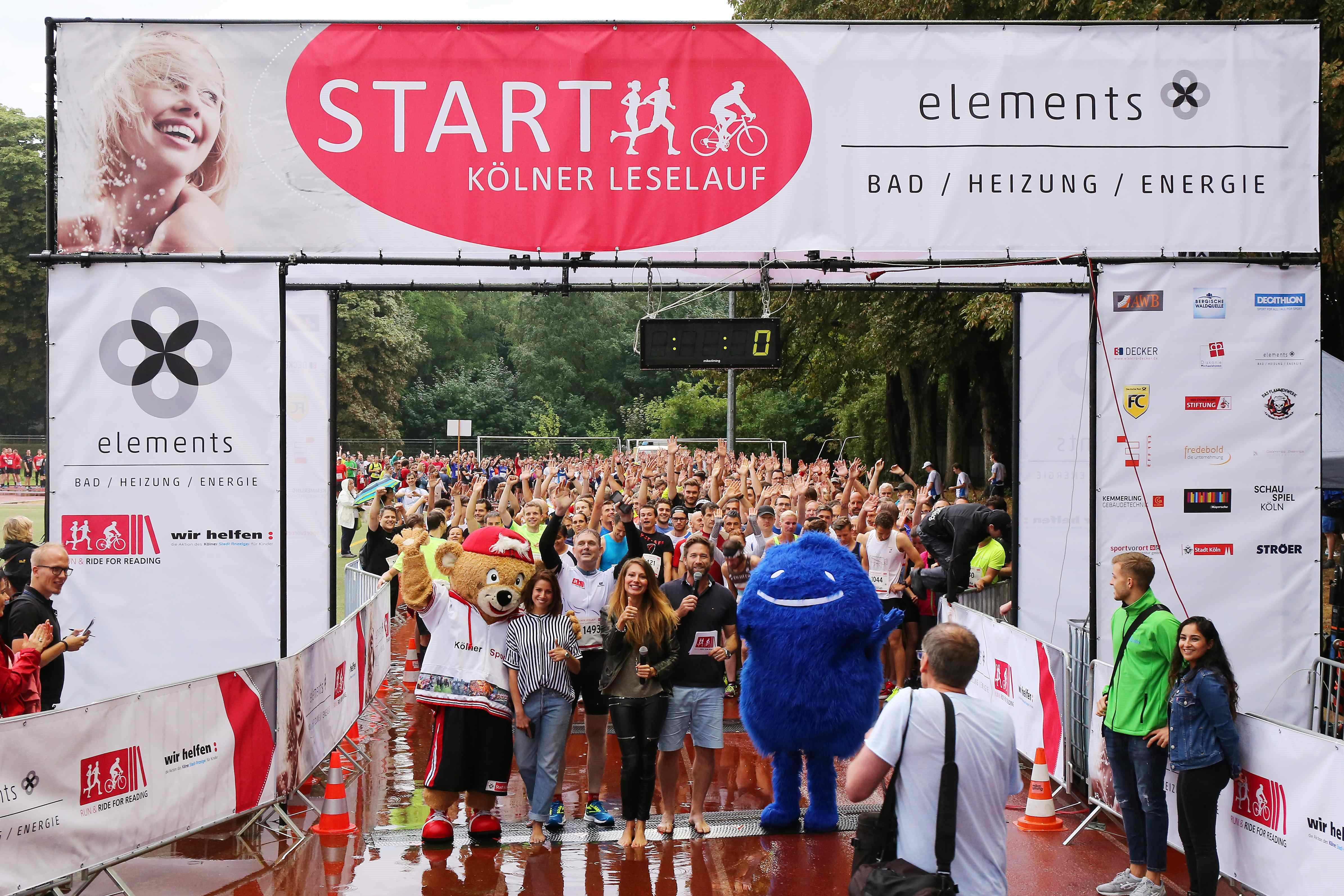 Cologne Run & Ride for Reading 2017